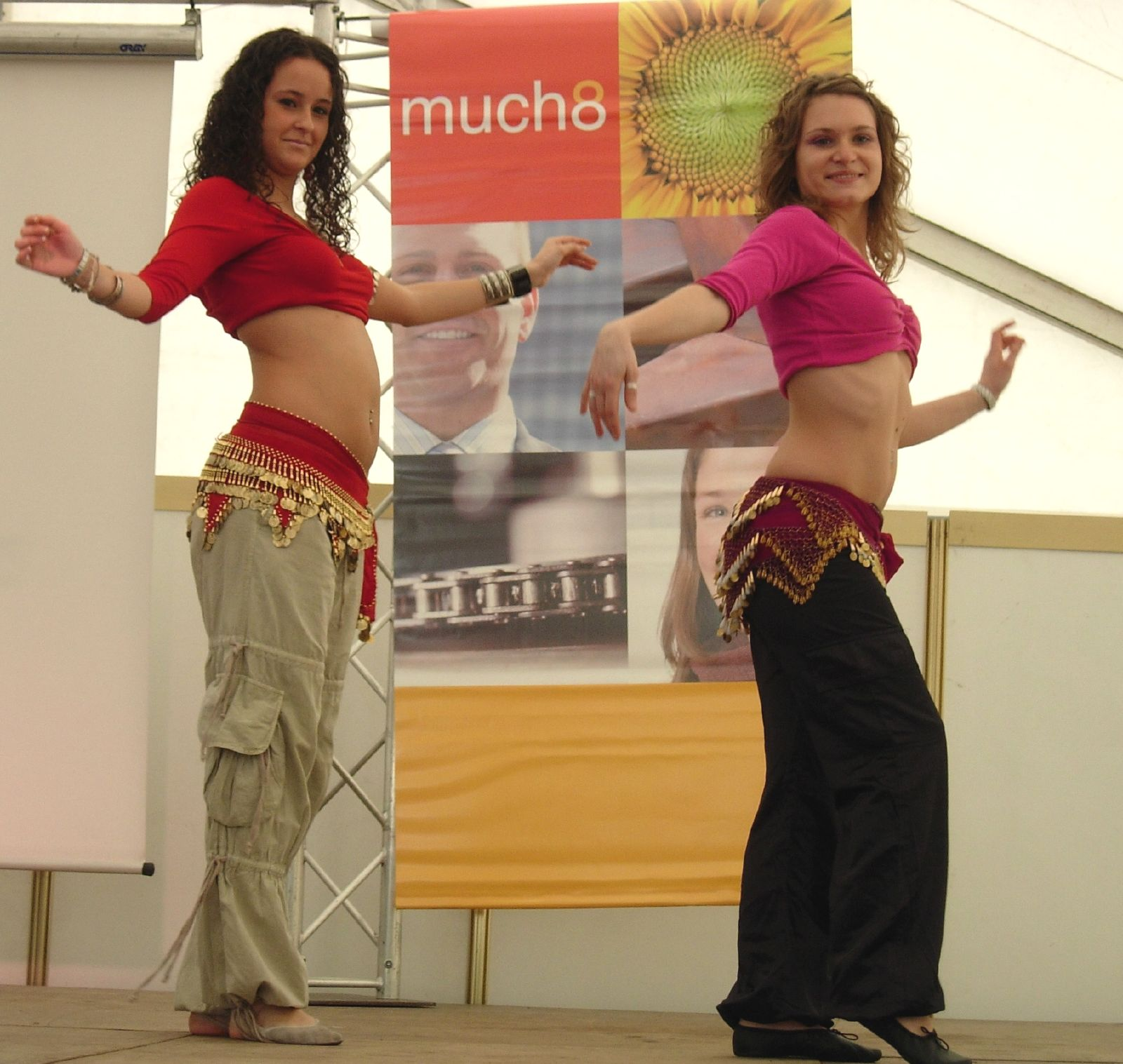 Video en YouTube